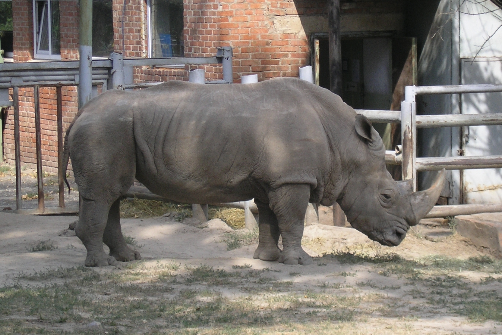 Rhino in Rostov-on-Don Zoo